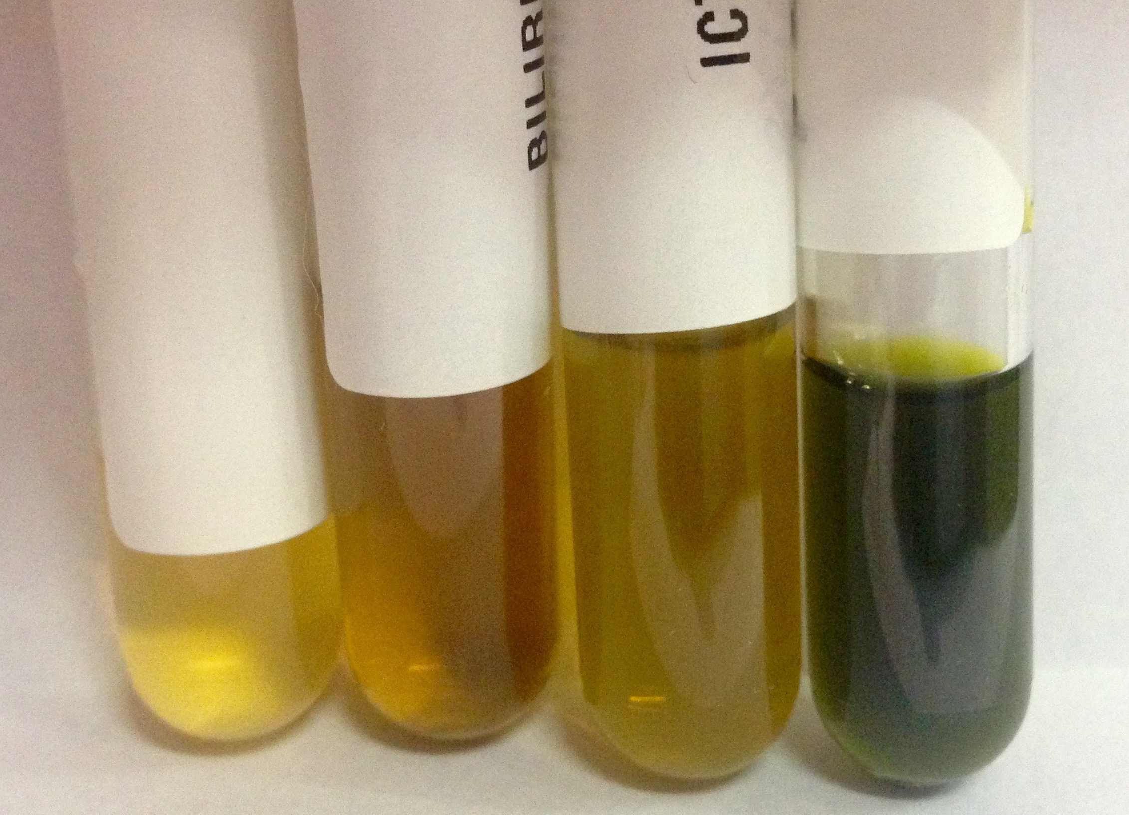 Mostres de serum humà contingudes en tubs d'assaig on es poden comparar els nivells de bilirubina.